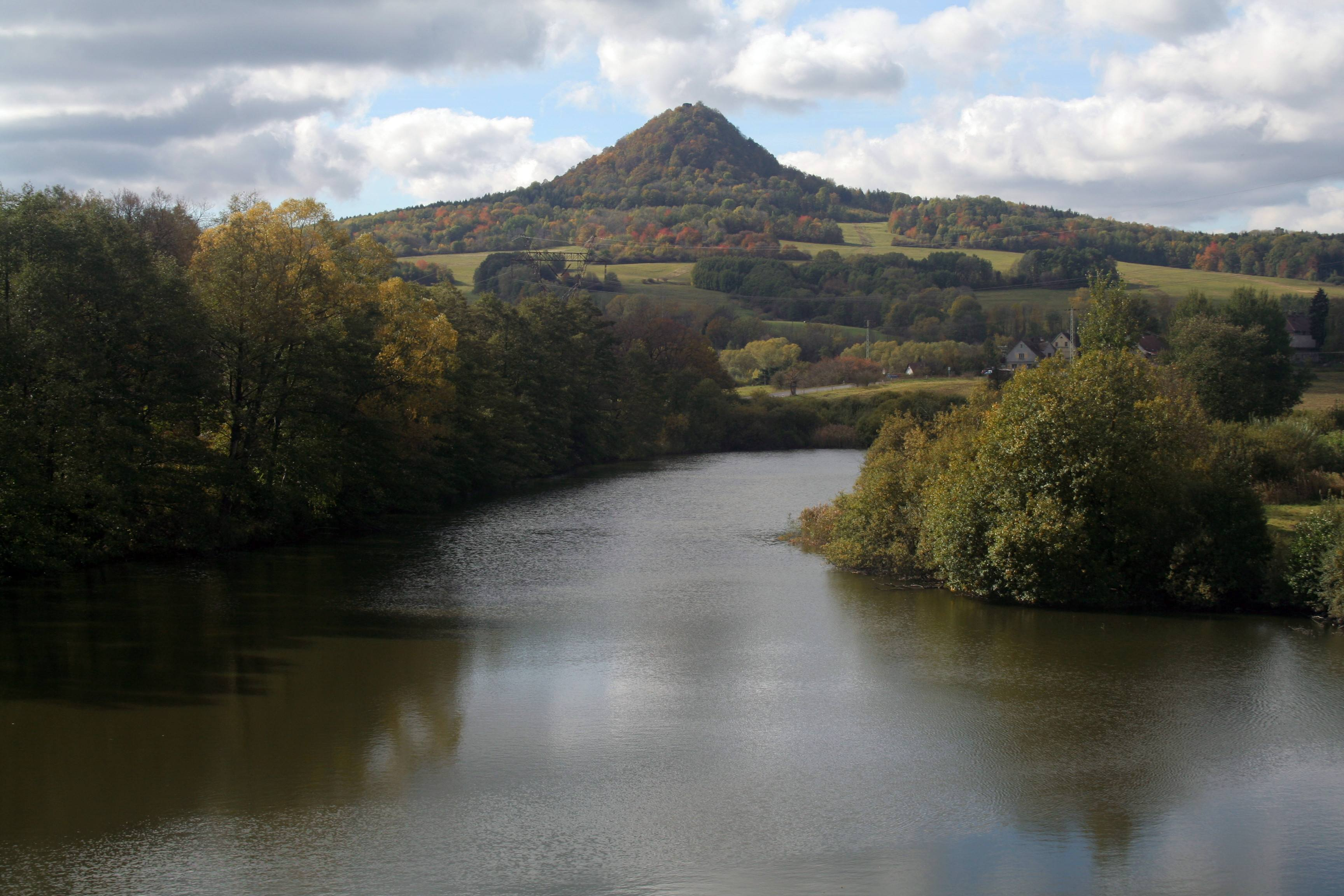 Pohled na vrch Ronov, okres Česká Lípa.